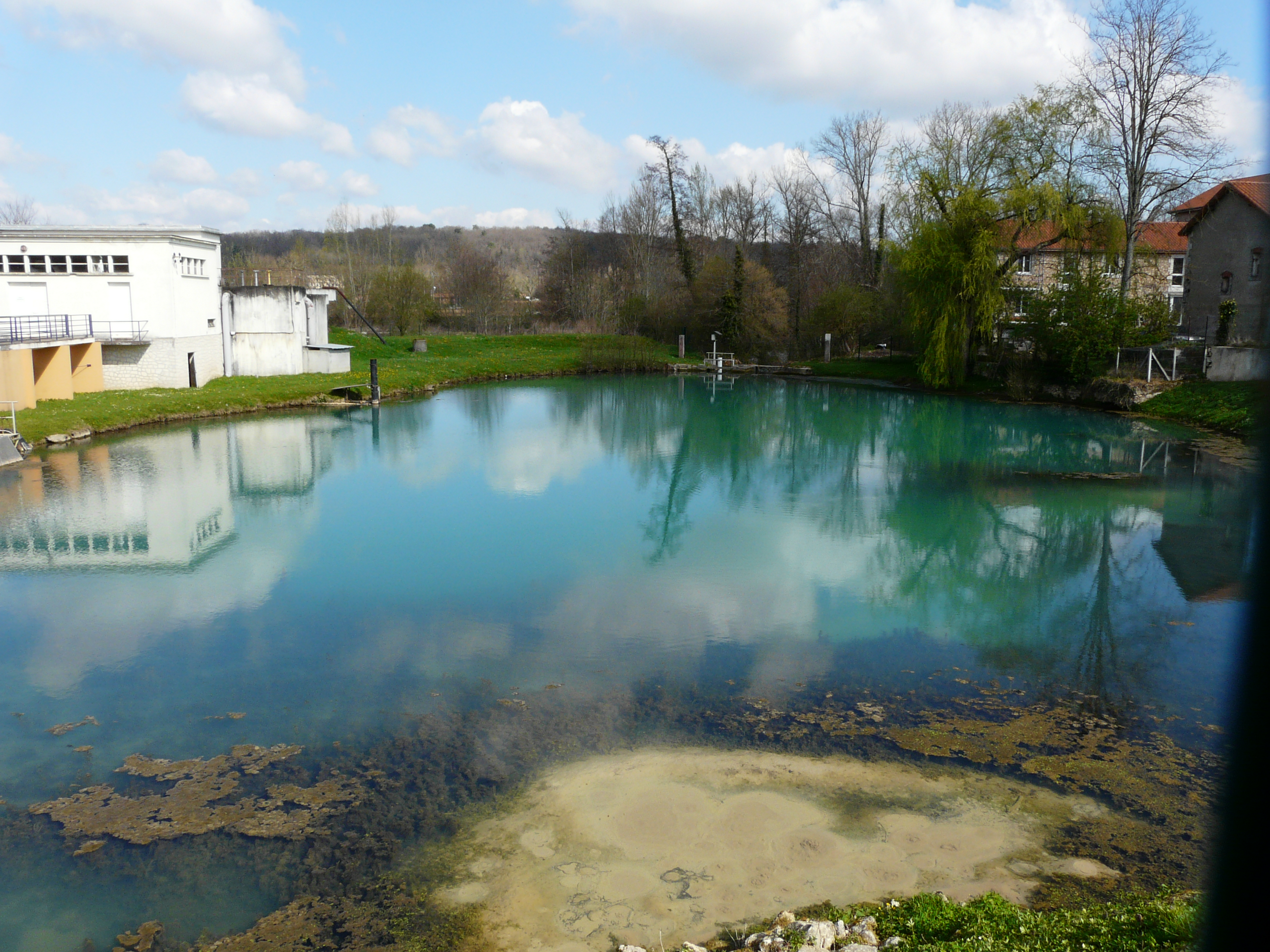 La source des Moulineaux, Razac-sur-l'Isle, Dordogne, France.